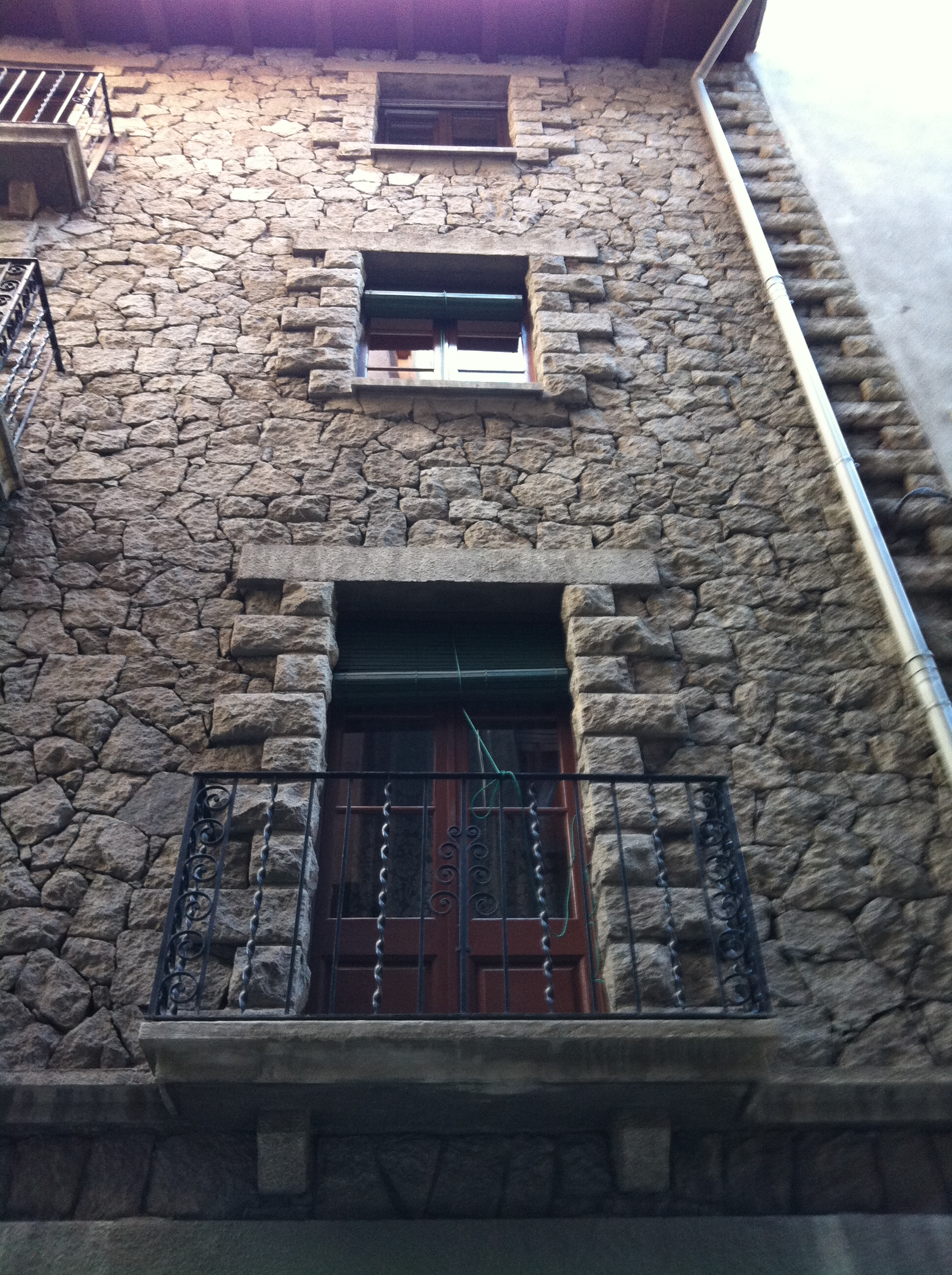 Casa Xurrina